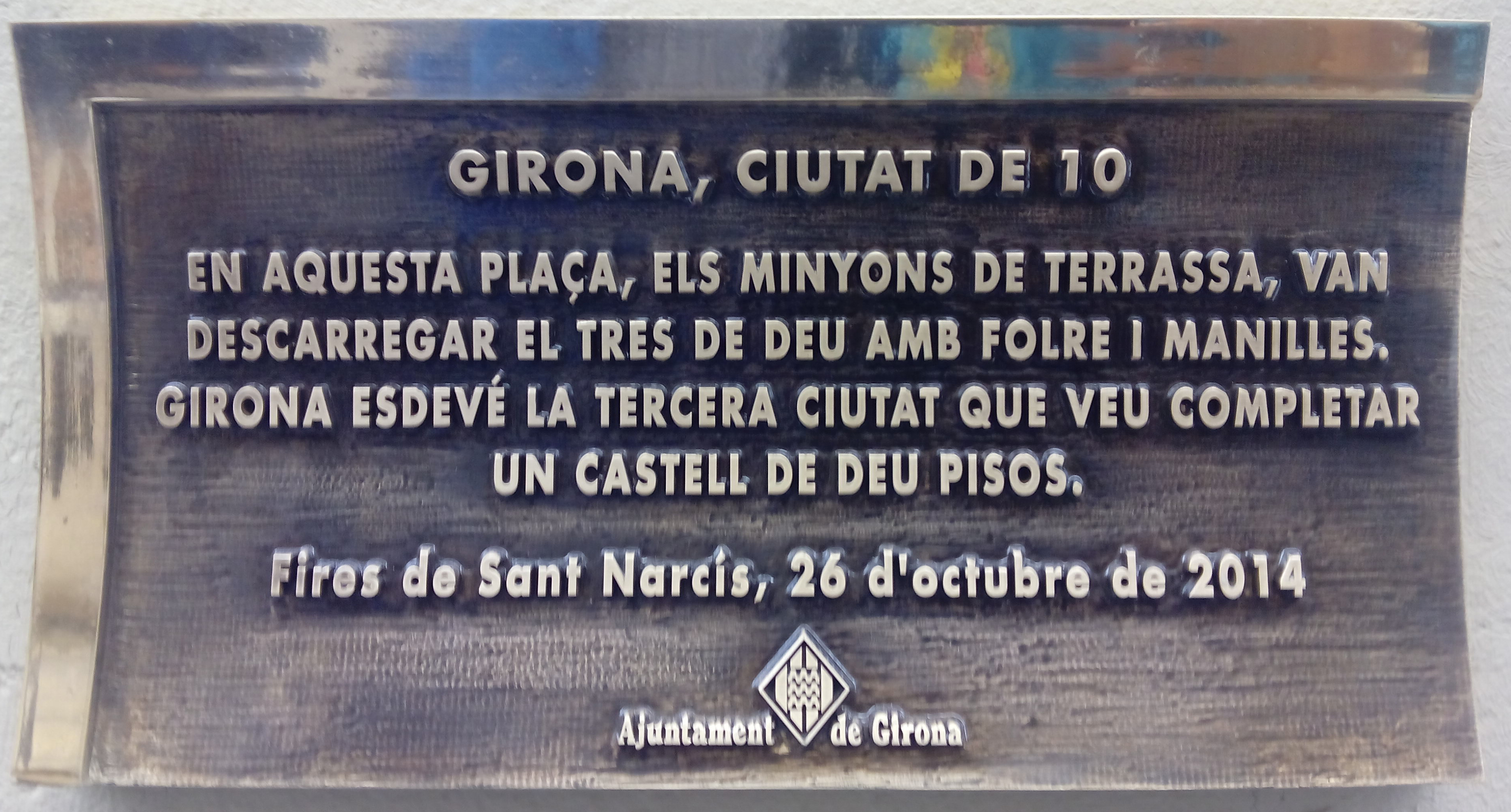 Segona placa de l'Ajuntament de Girona a Plaça del Vi dedicada als Minyons de Terrassa, en aquest cas per commemorar el 3 de 10 amb folre i manilles descarregat del 2014.